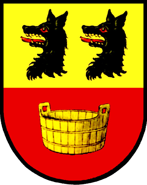 Wappen der Gemeinde Sankt Radegund bei Graz in Österreich